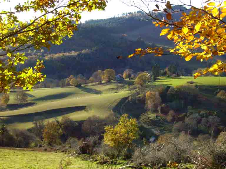 paysage de Creuse